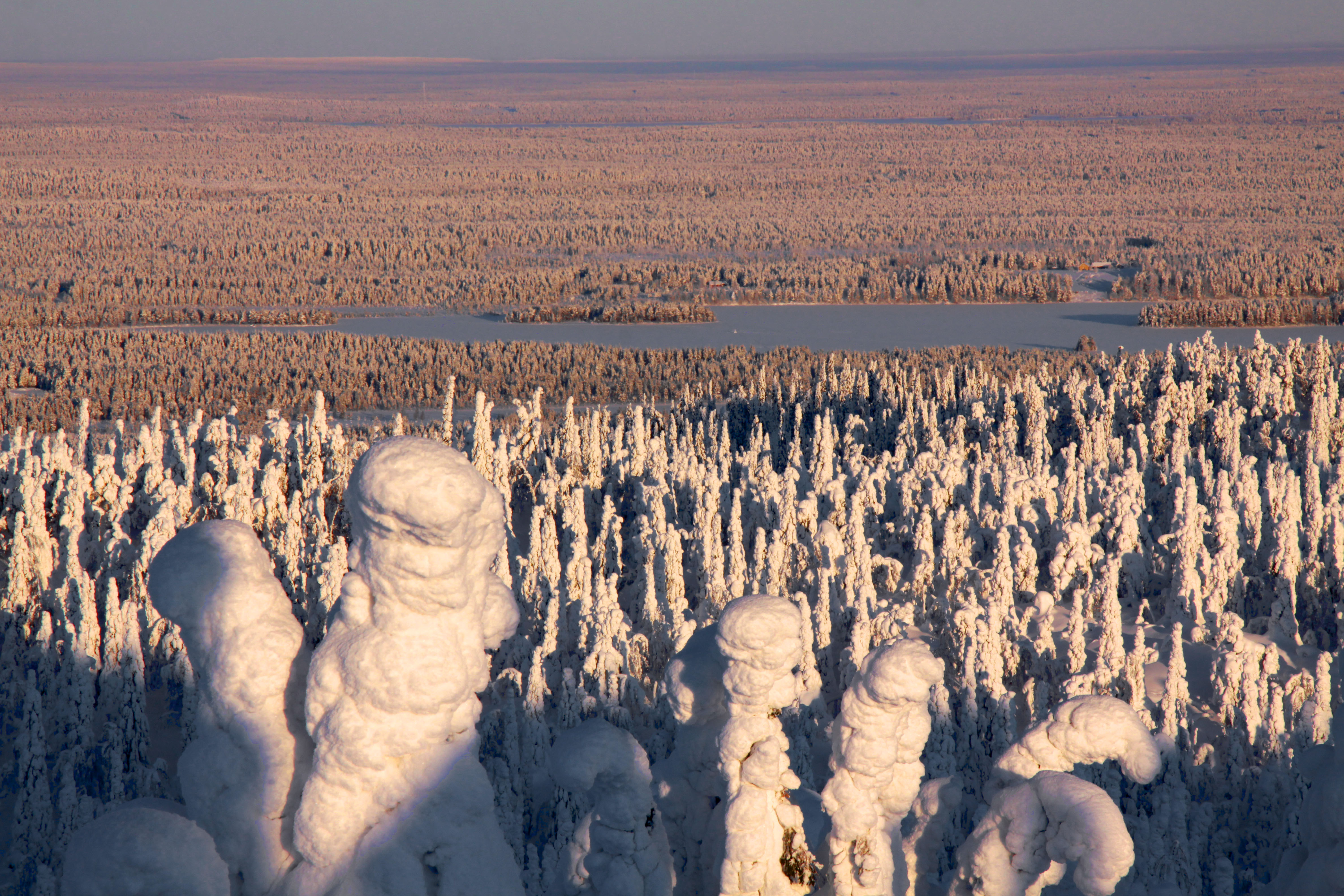 Kuusamo. Au sommet du mont Livaara.